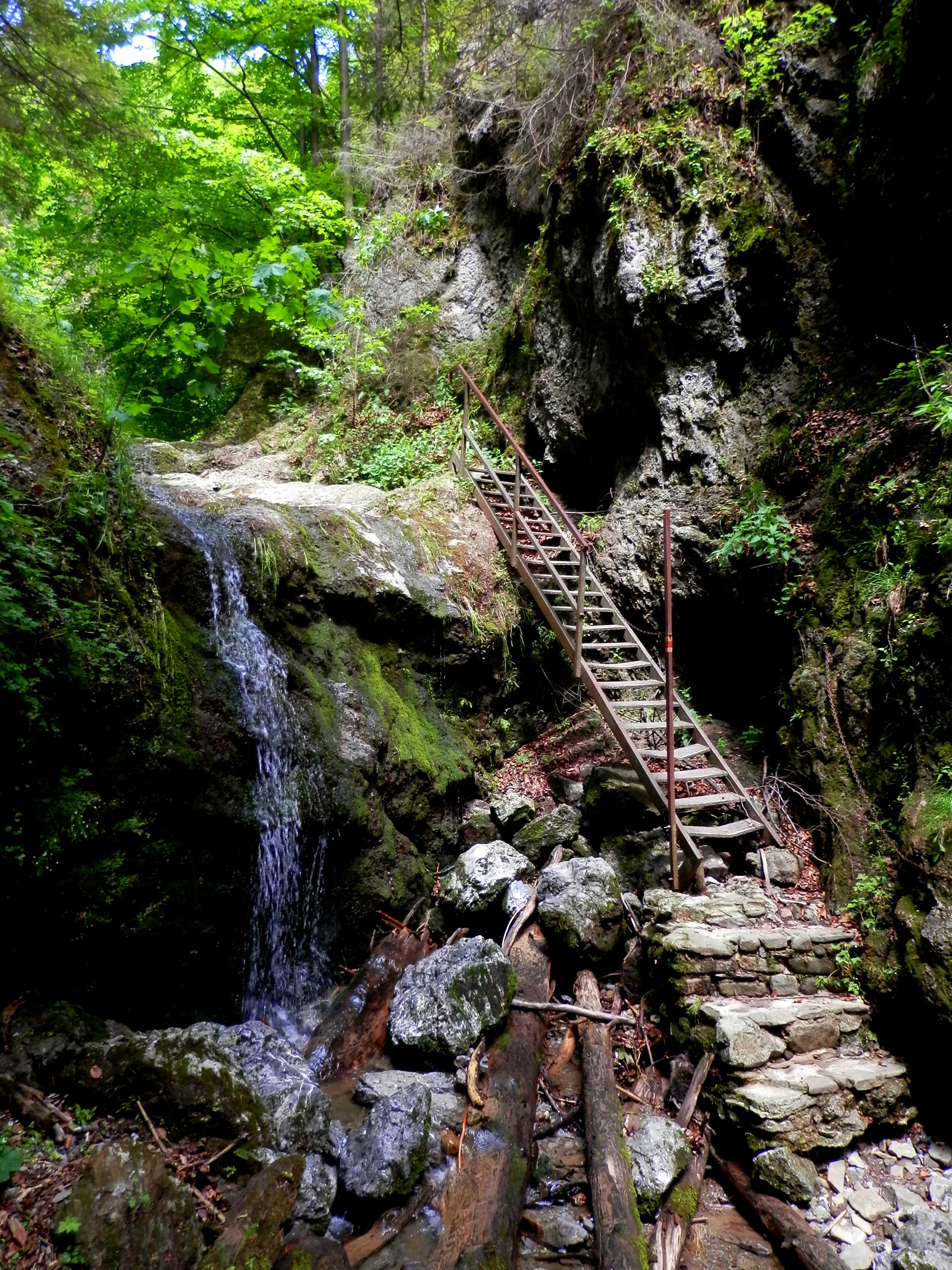 Národná prírodná rezervácia Lačnovský kaňon. Obec Lipovce, okres Prešov.